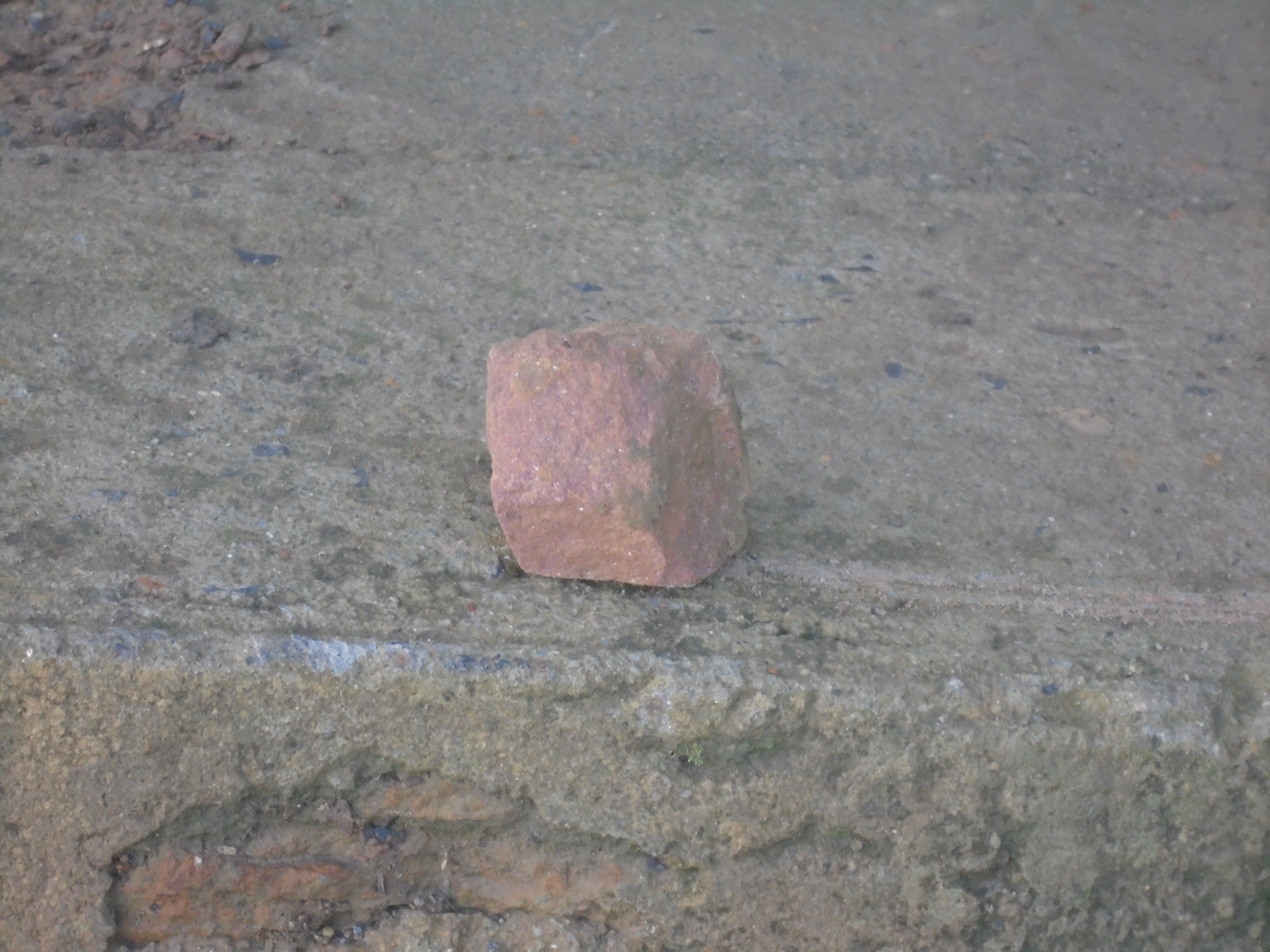 Un pedazo de bauxita